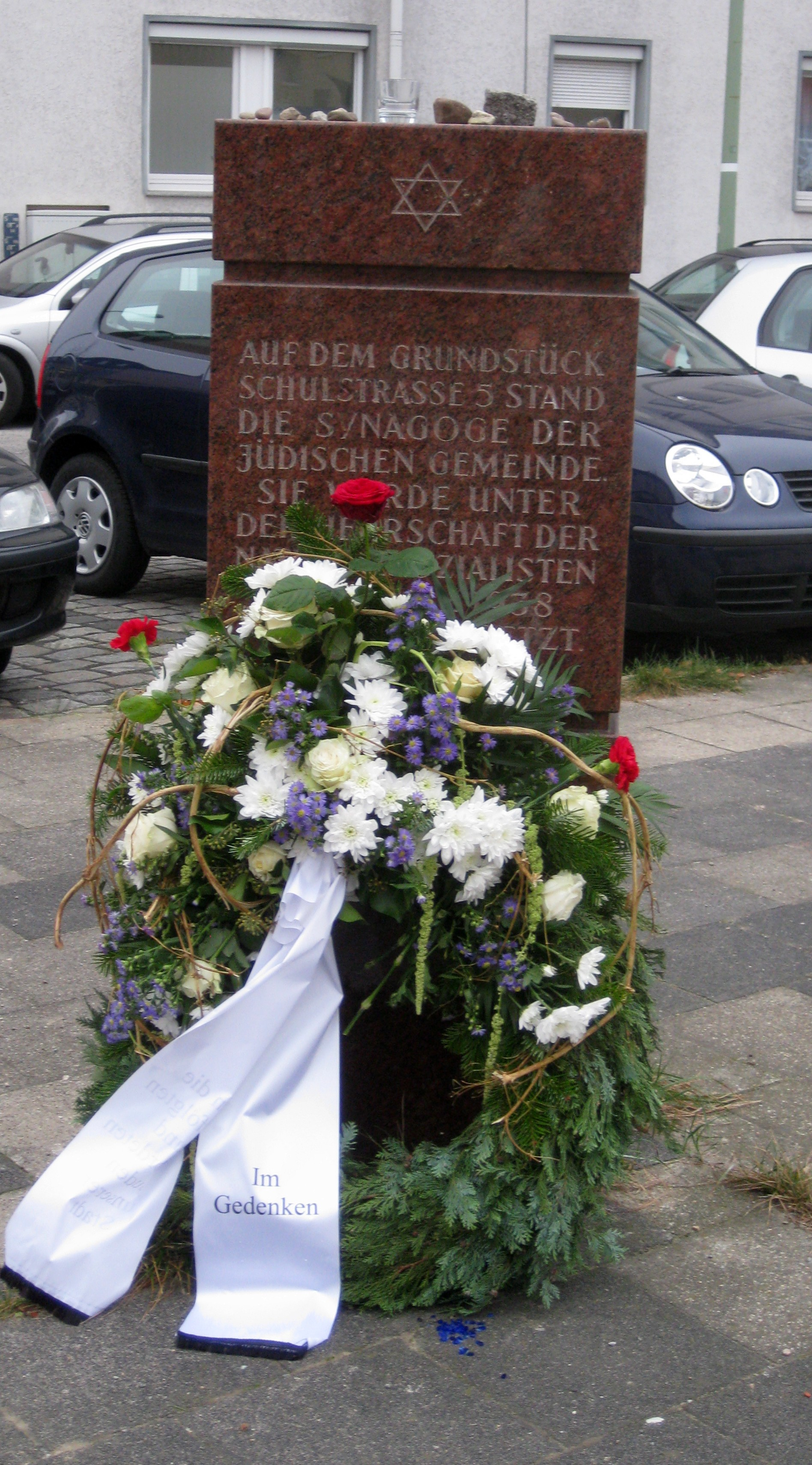 Gedenkstein in der Schulstr. 5 - hier stand bis zum 9.11.1938 die Synagoge in Bremerhaven.